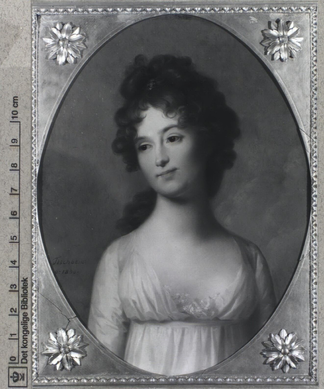 Frederikke (1780-1862) prinsesse af Slesvig-Holsten-Sønderborg-Beck, Billedsamlingen. Danske portrætter. Frederikke (1780-1862) 8°